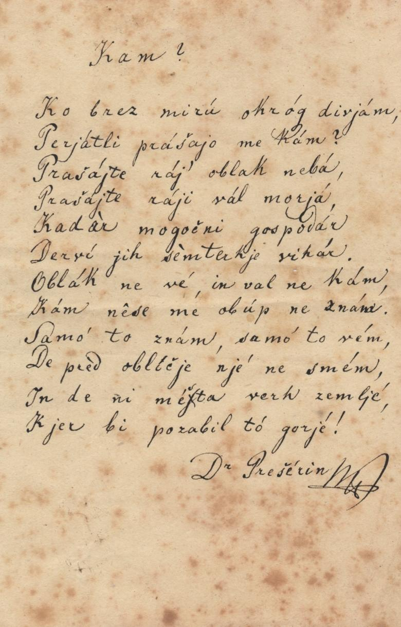 Rokopis pesmi Kam?.